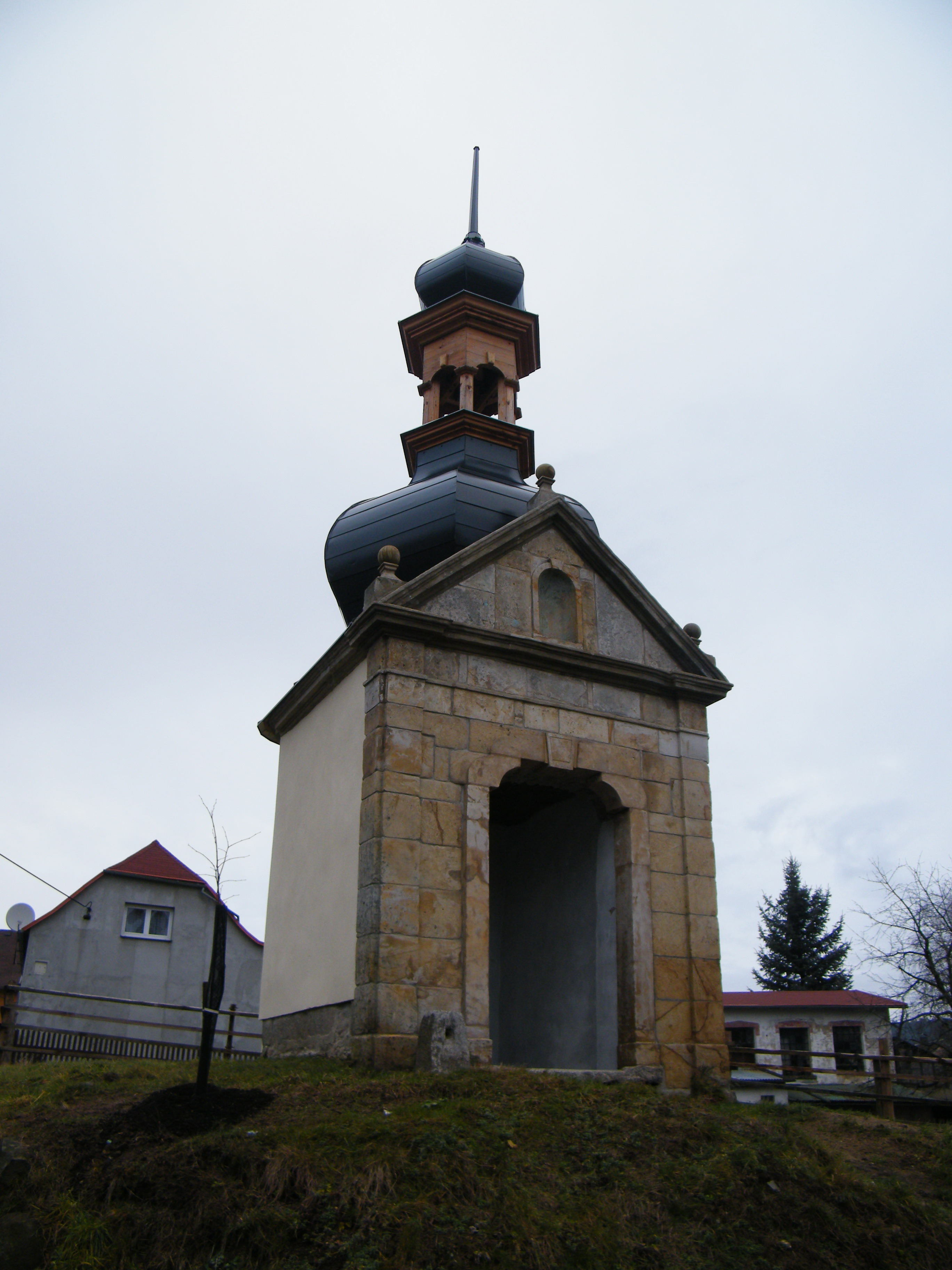 Kaple Tří otců v Mikulášovicích (2013)